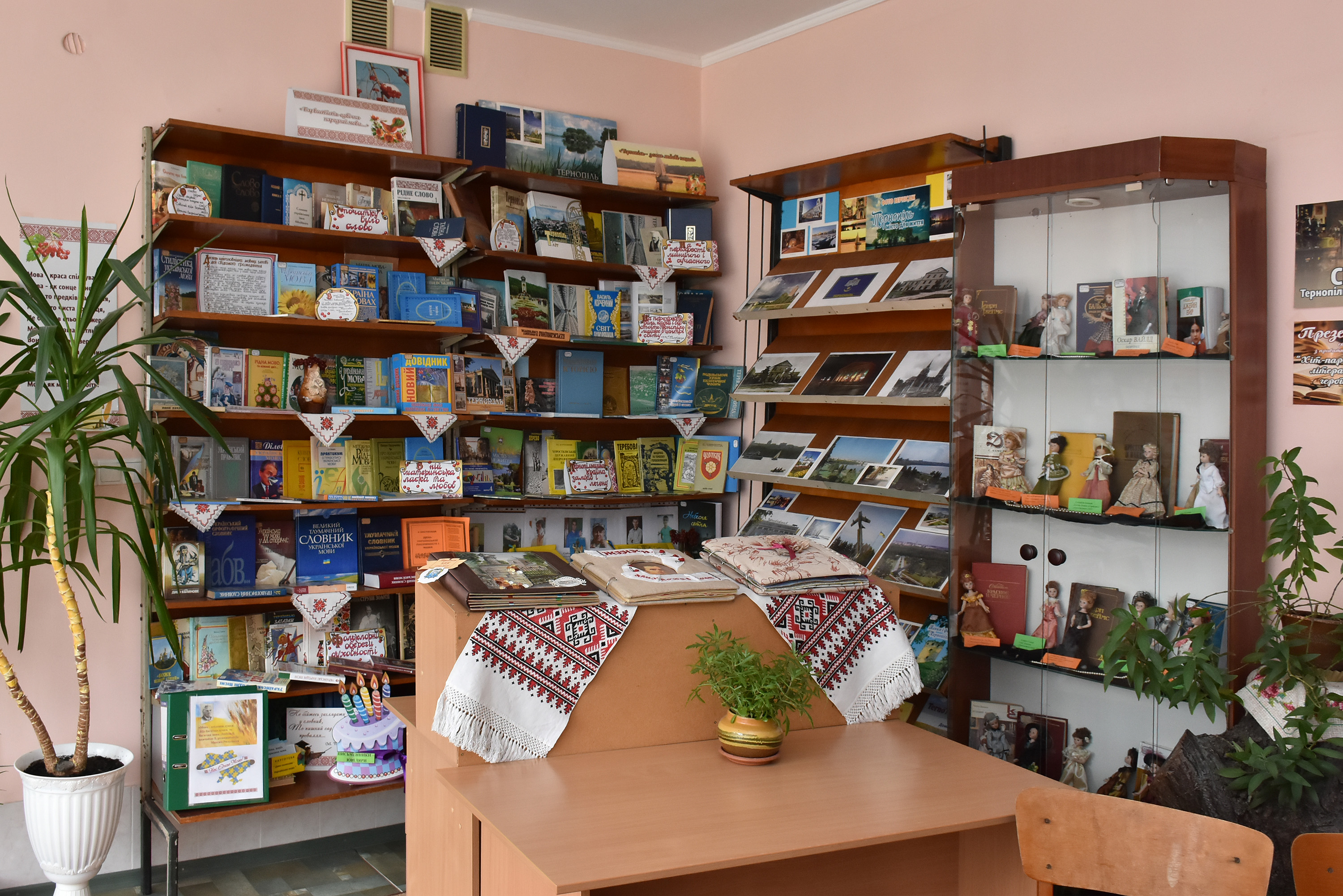 Бібліотека № 5 для дорослих Тернопільської міської централізованої бібліотечної системи.